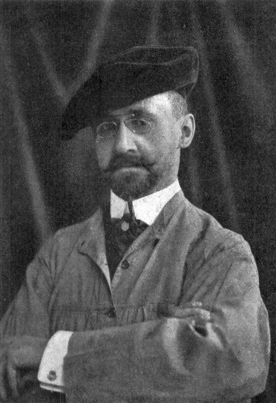 Крачковский, Иосиф Евстафиевич